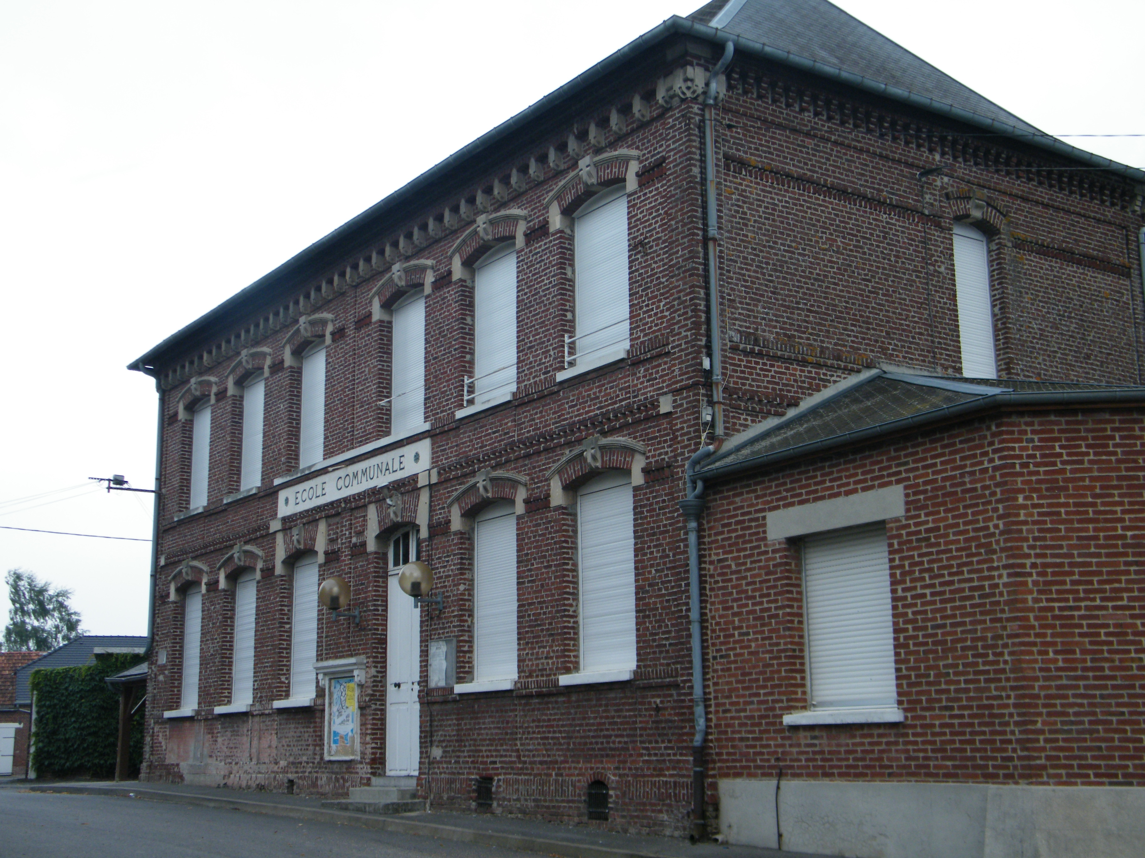 Ecole communale.